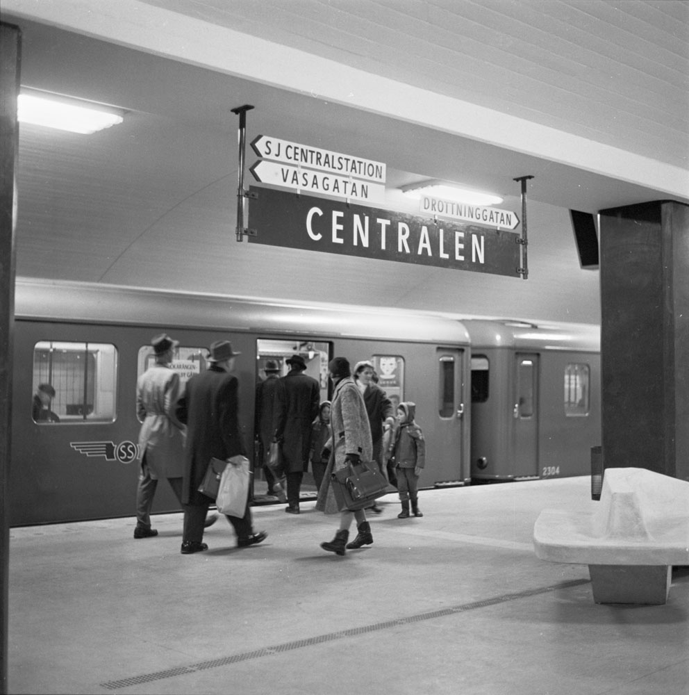 Tunnelbanans Centralen före namnbyte till T-Centralen den 19 november 1958. Ett tunnelbanetåg av med en C2 vagn med nr 2304 står inne vid platformen.